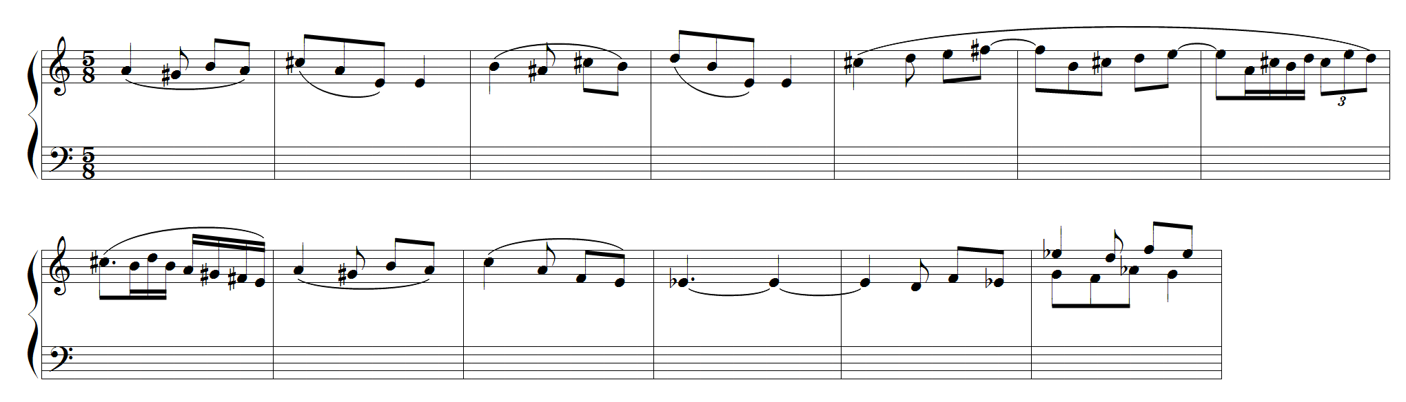 Anton Reicha - sujet de la fugue n°20 des 36 fugues, op.36